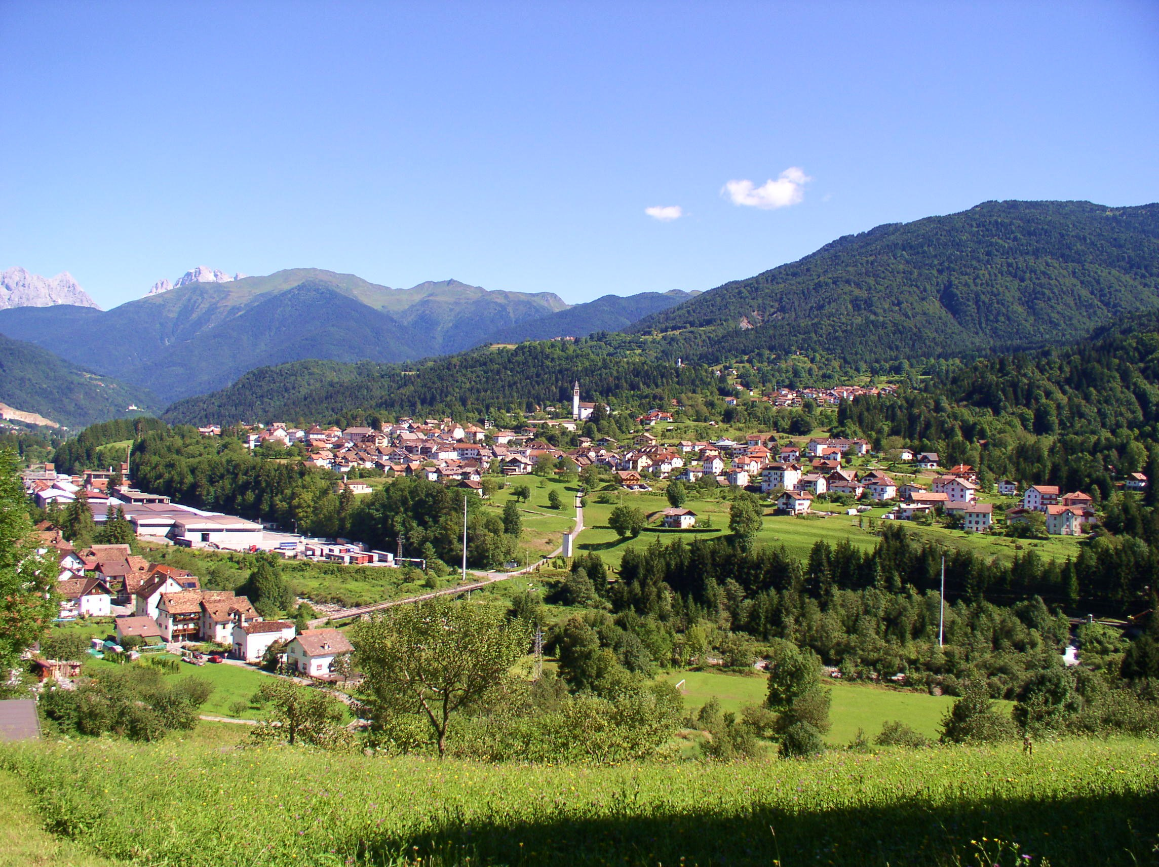 Ovaro, Carnia, Friuli-Venezia Giulia, Italia